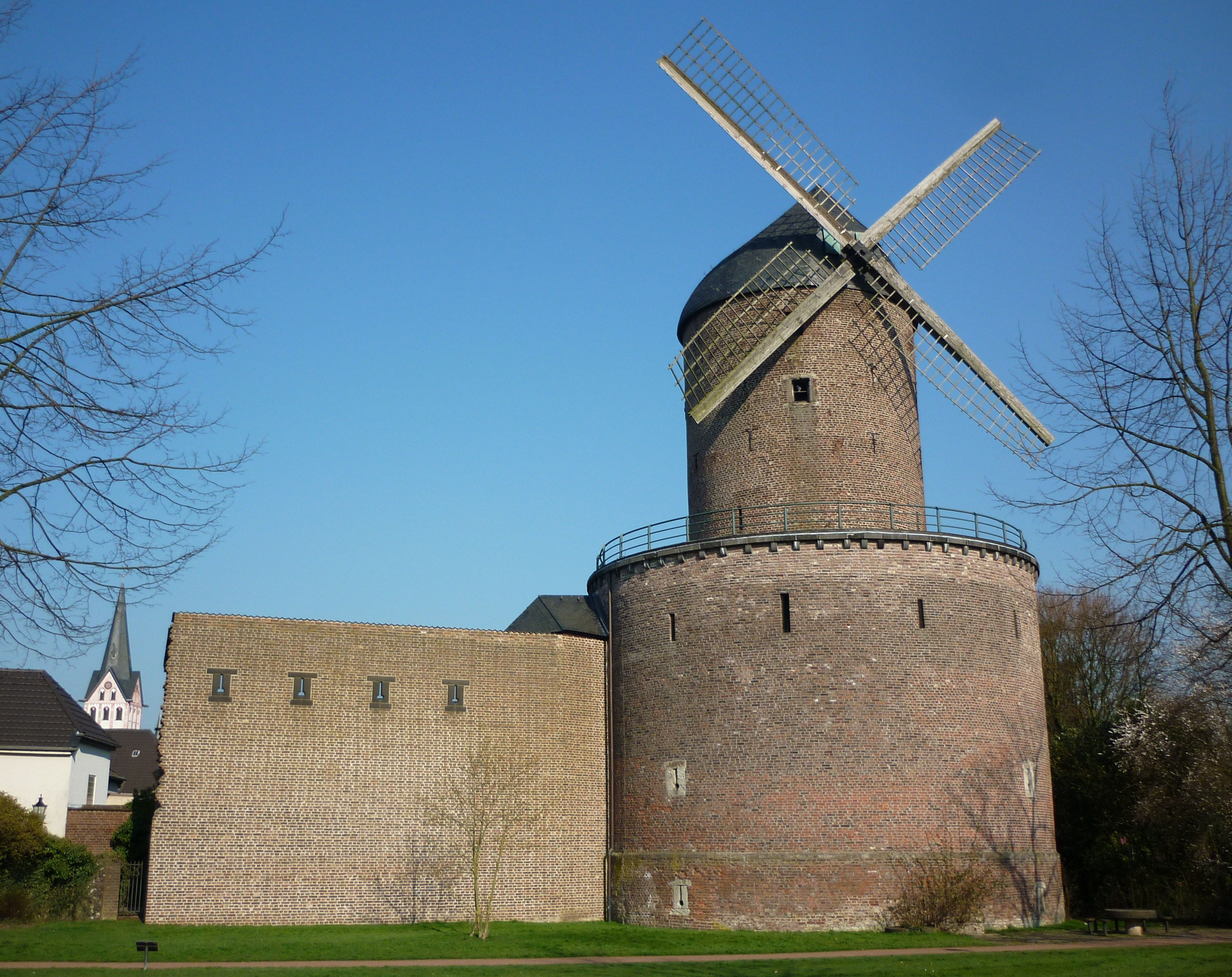 Kempen, Turmwindmühle, Hessenwall 1 This image shows a heritage building in Germany, located in the North Rhine-Westphalian city Kempen (no. 3c).